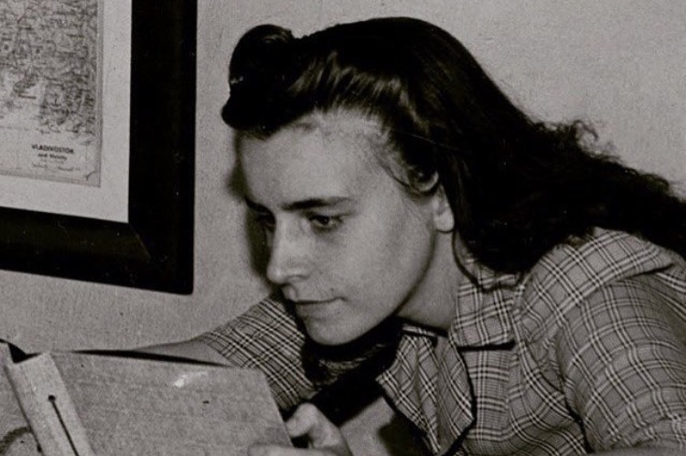 La poeta y periodista venezolana Ida Gramcko (1924-1994).